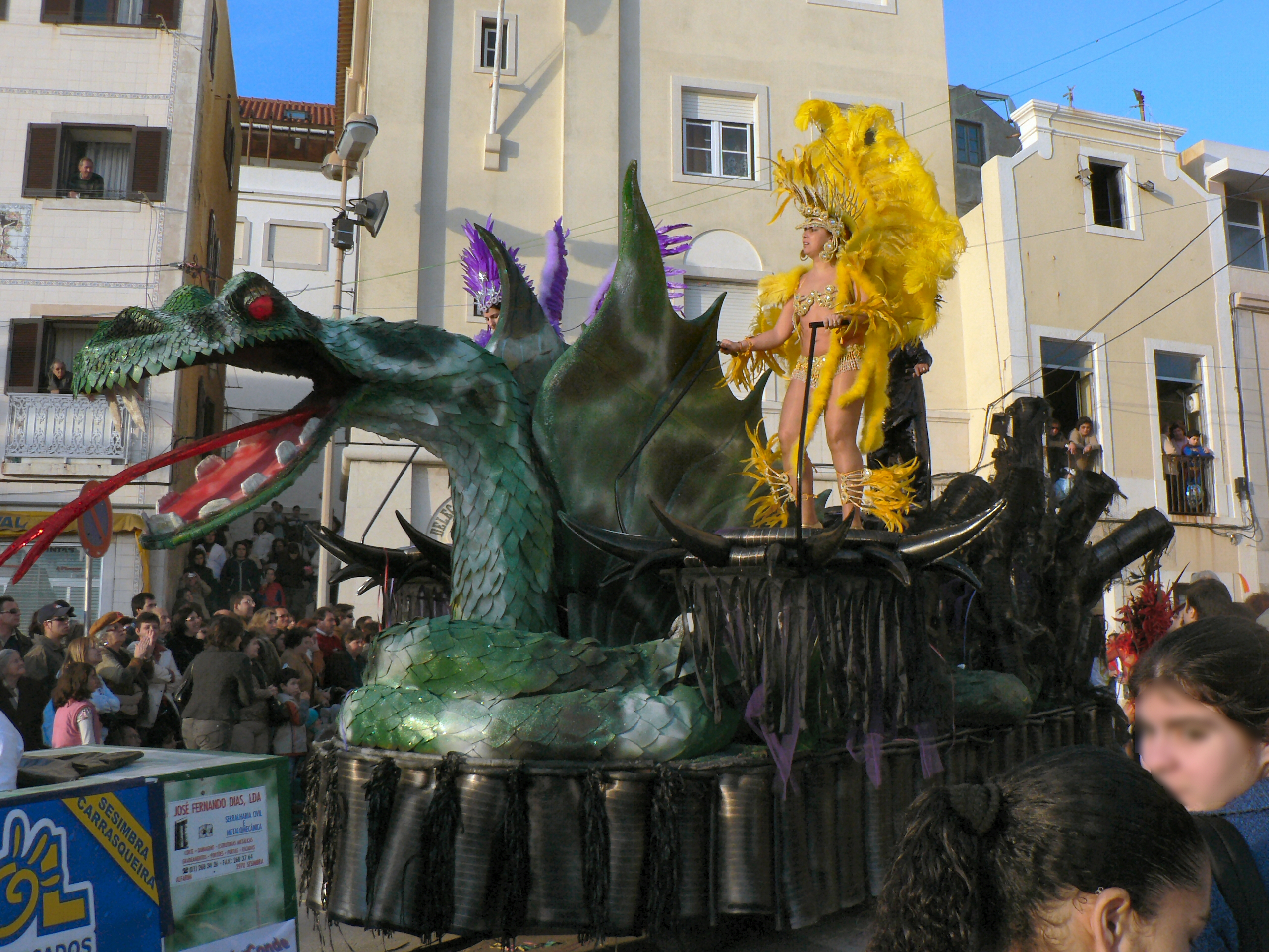 Desfile de Carnaval em Sesimbra 2007